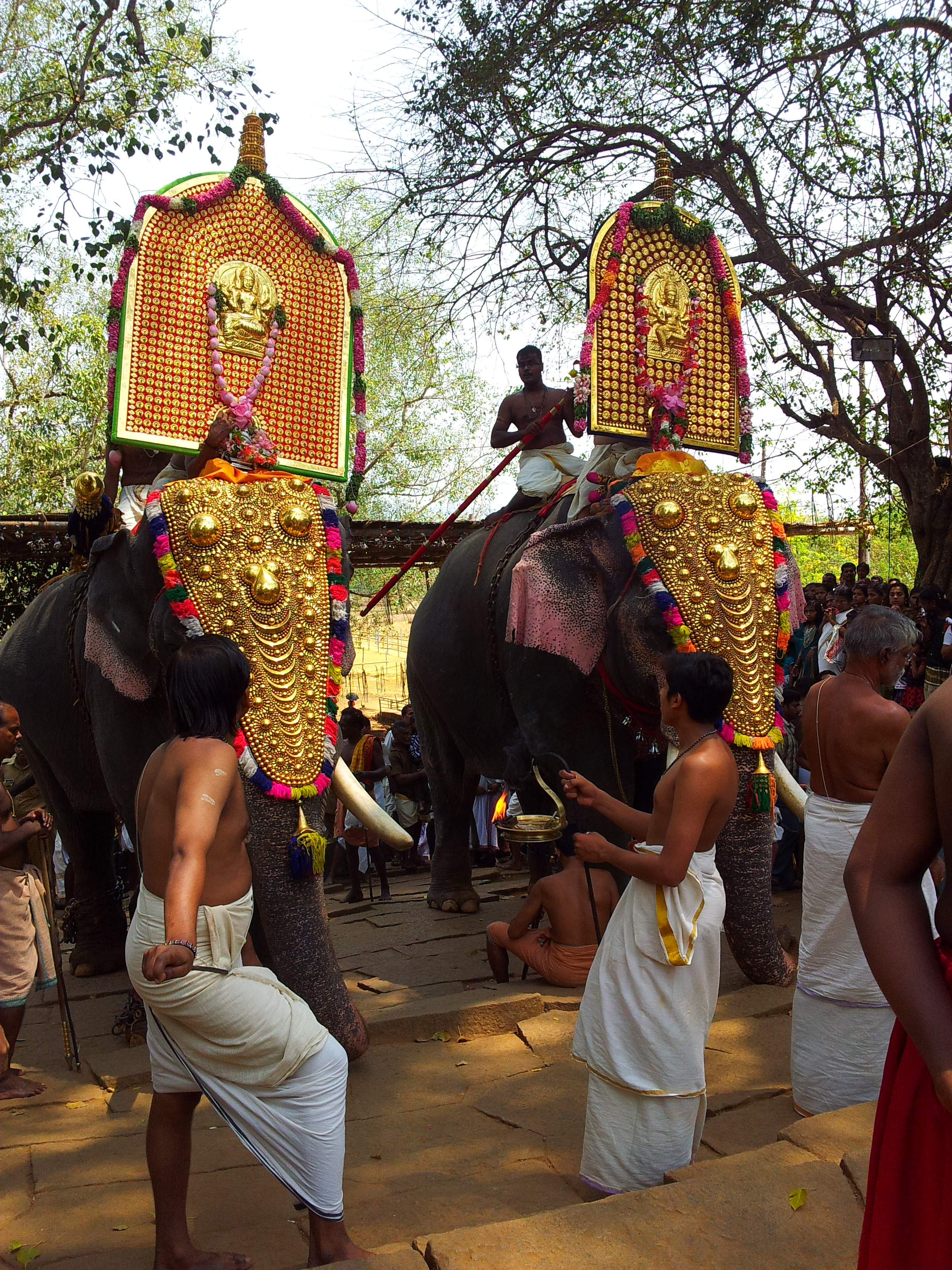 തിരുമാന്ധാംകുന്ന് പൂരം - എട്ടാം ദിവസത്തെ ആറാട്ടിന് ശേഷമുള്ള കൊട്ടിക്കയറ്റം